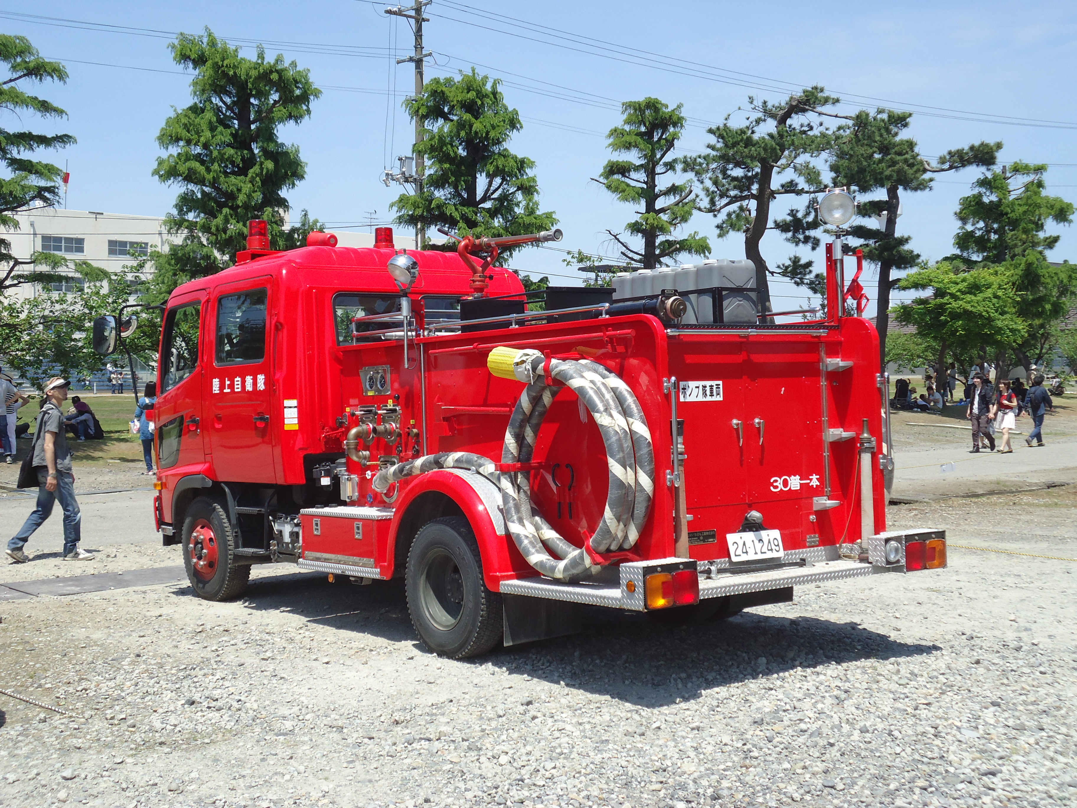 陸上自衛隊新発田駐屯地業務隊の消防車